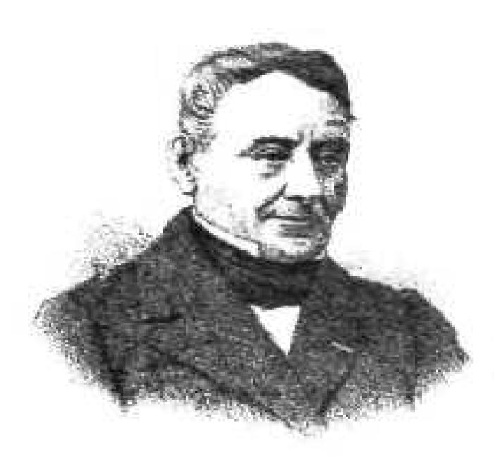 Griechischer Gelehrter, 19. Jahrhundert